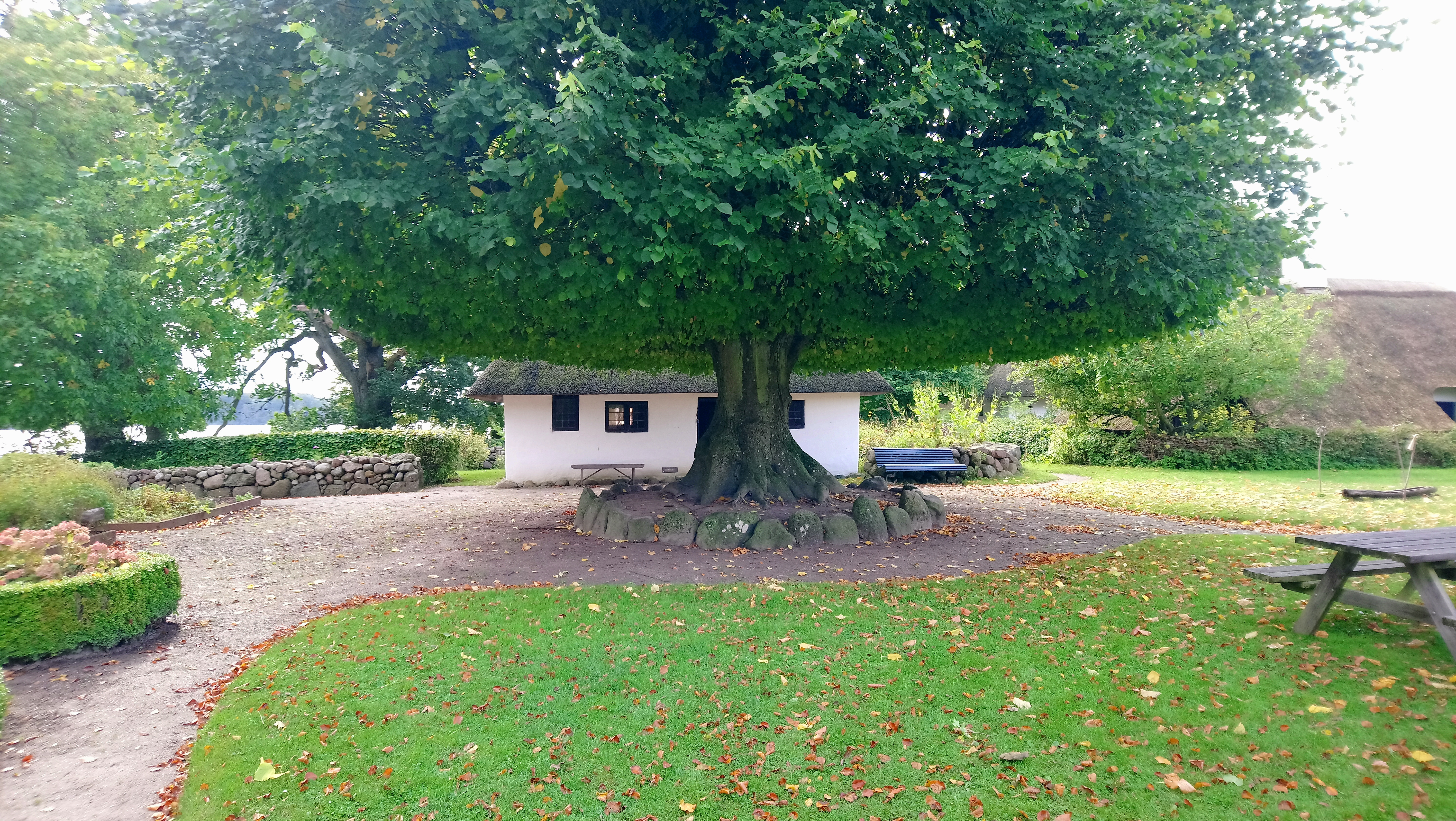 Fra begyndelsen af 1800-tallet. Kom til museet i 1926.